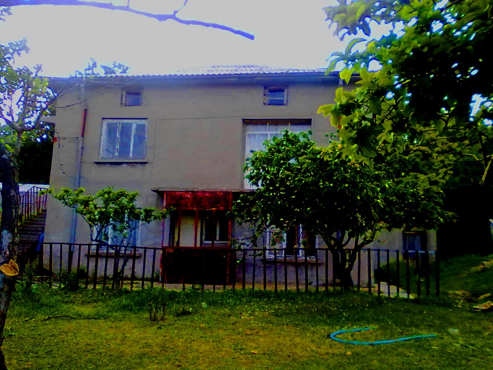 Махала Аптовце-Краставо,Гърнати